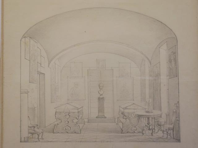 Эдвард Паўловіч. Праекты экспазіцыі Музея князёў Любамірскіх